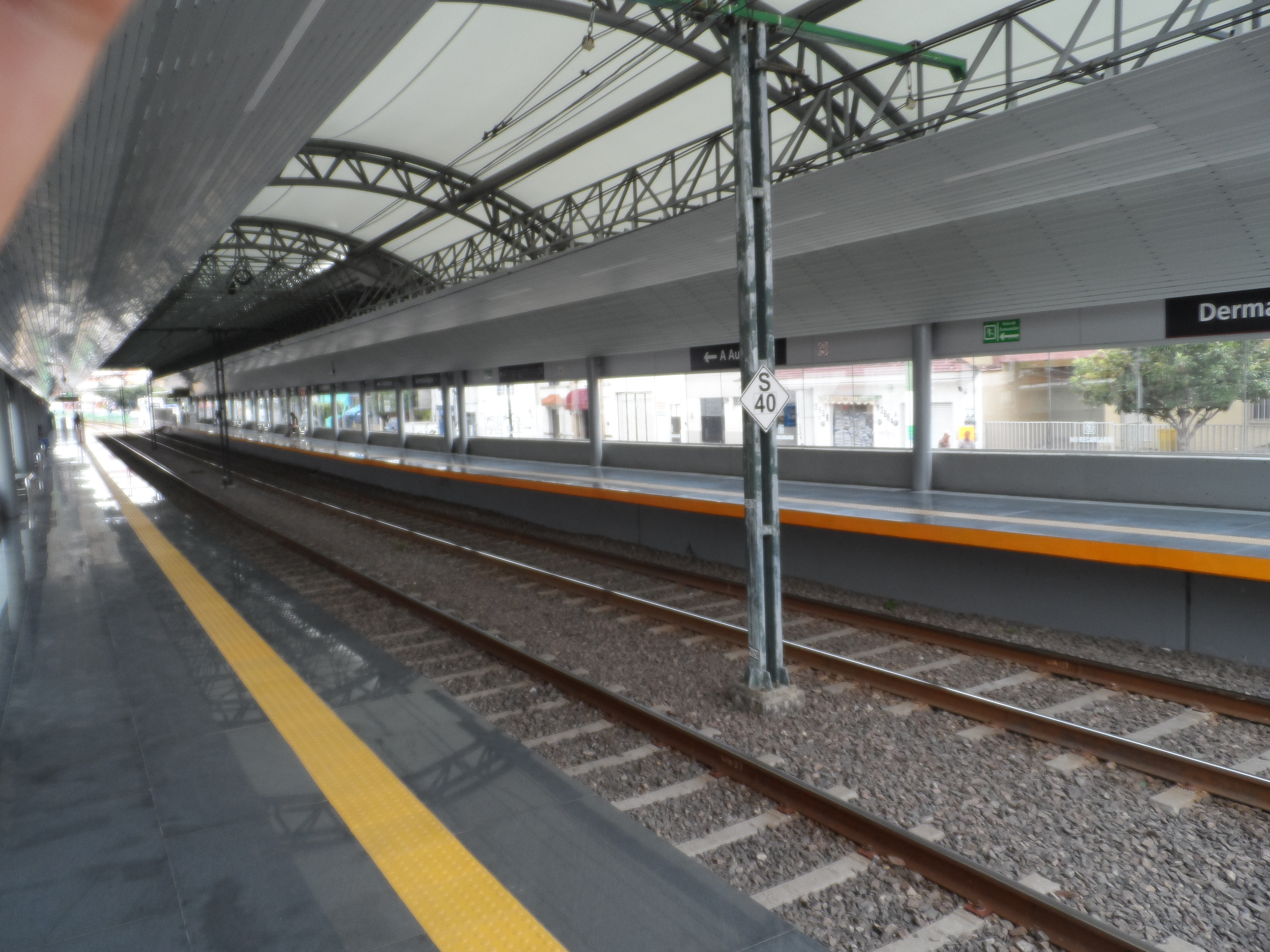 Andenes de la estación "Dermatológico" de la Línea 1 del Tren Ligero de Guadalajara.